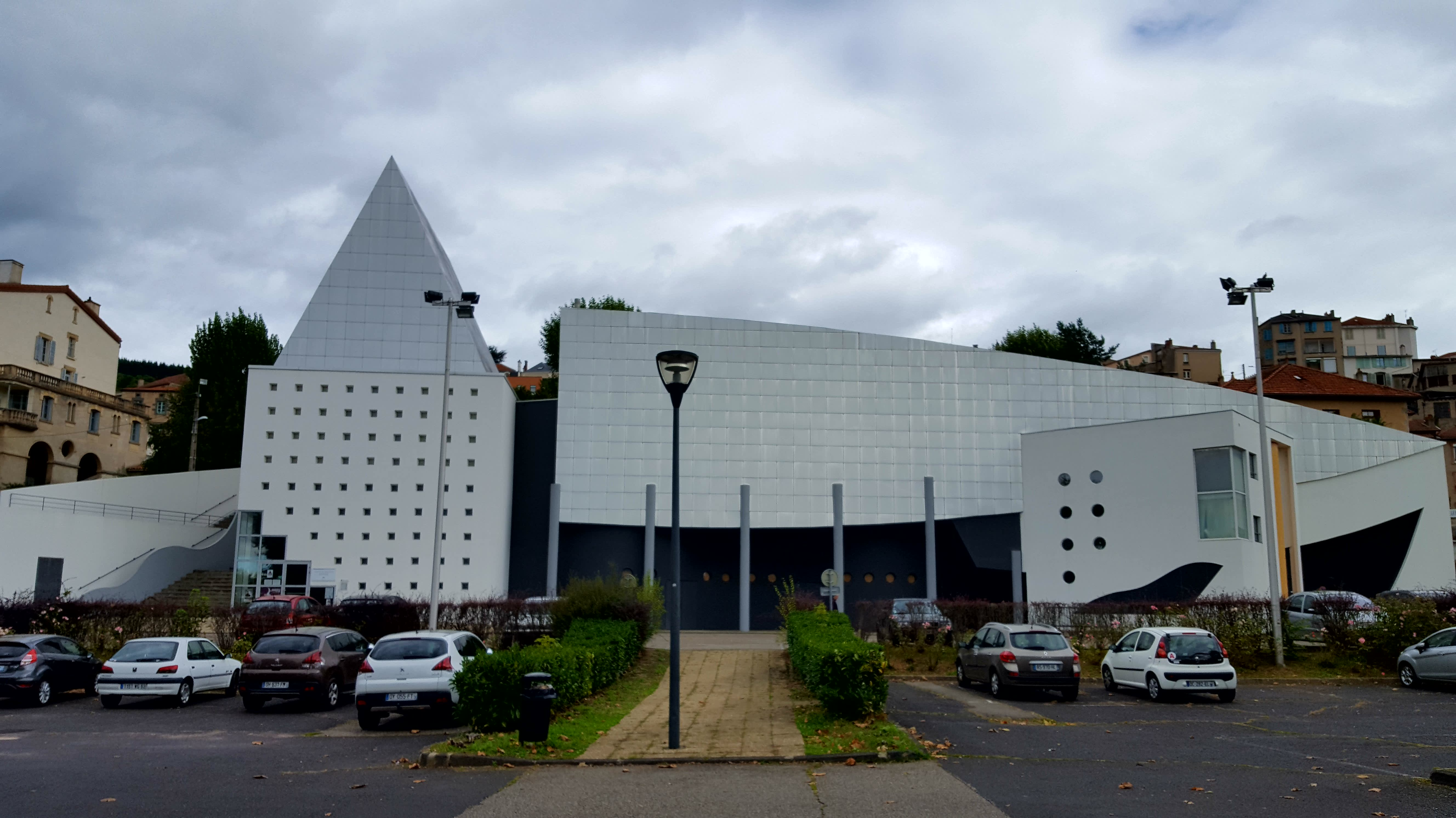 Salle espace à Thiers